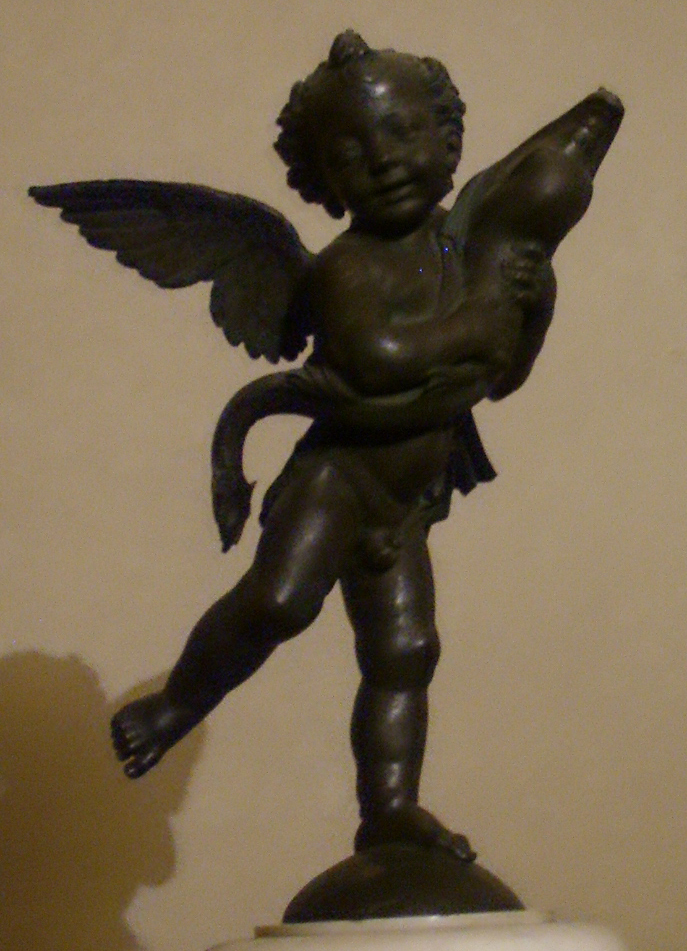 Andrea del verrocchio, putto con delfino